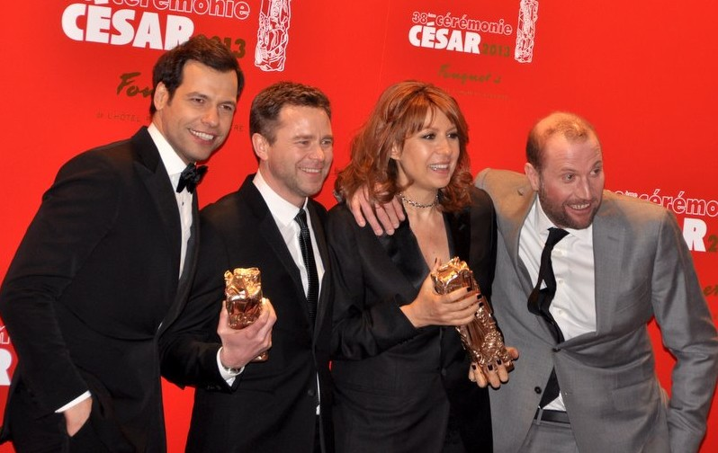 Laurent Lafitte, Guillaume de Tonquédec, Valérie Benguigui et François Damiens à la cérémonie des César